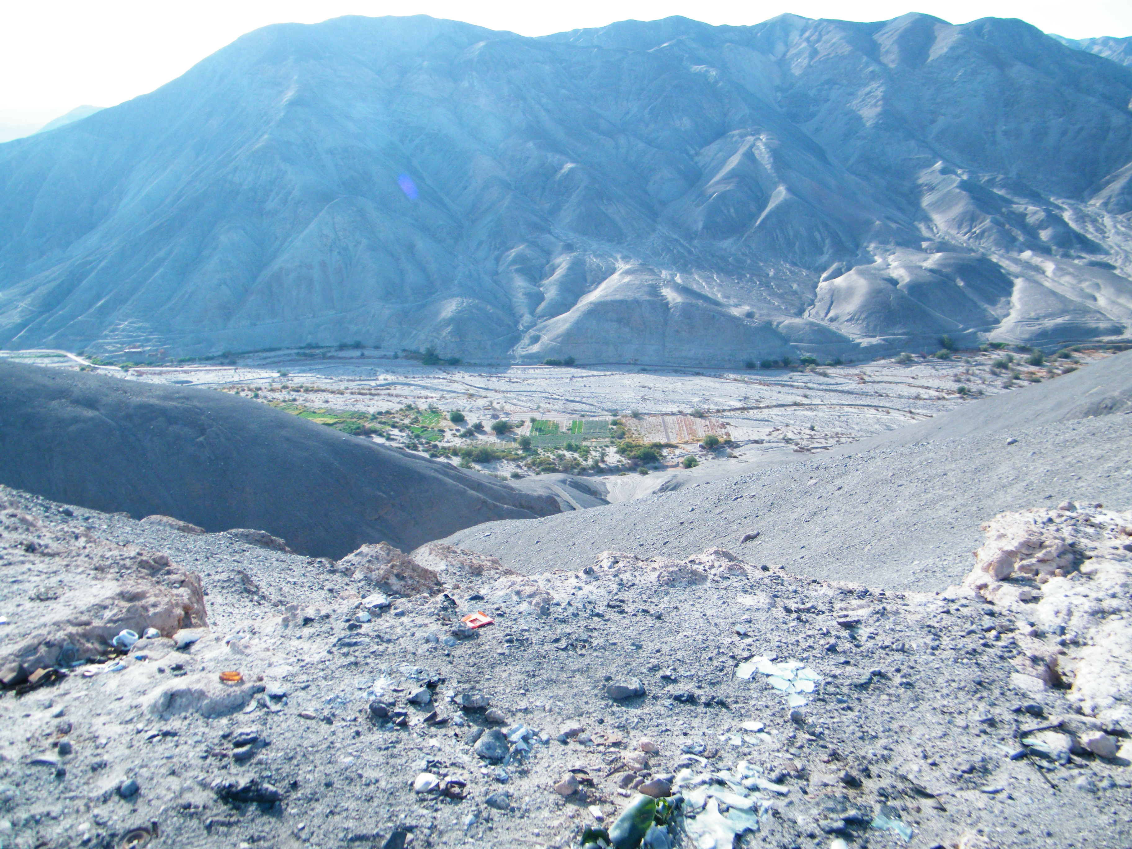 quebrada de tarapaca